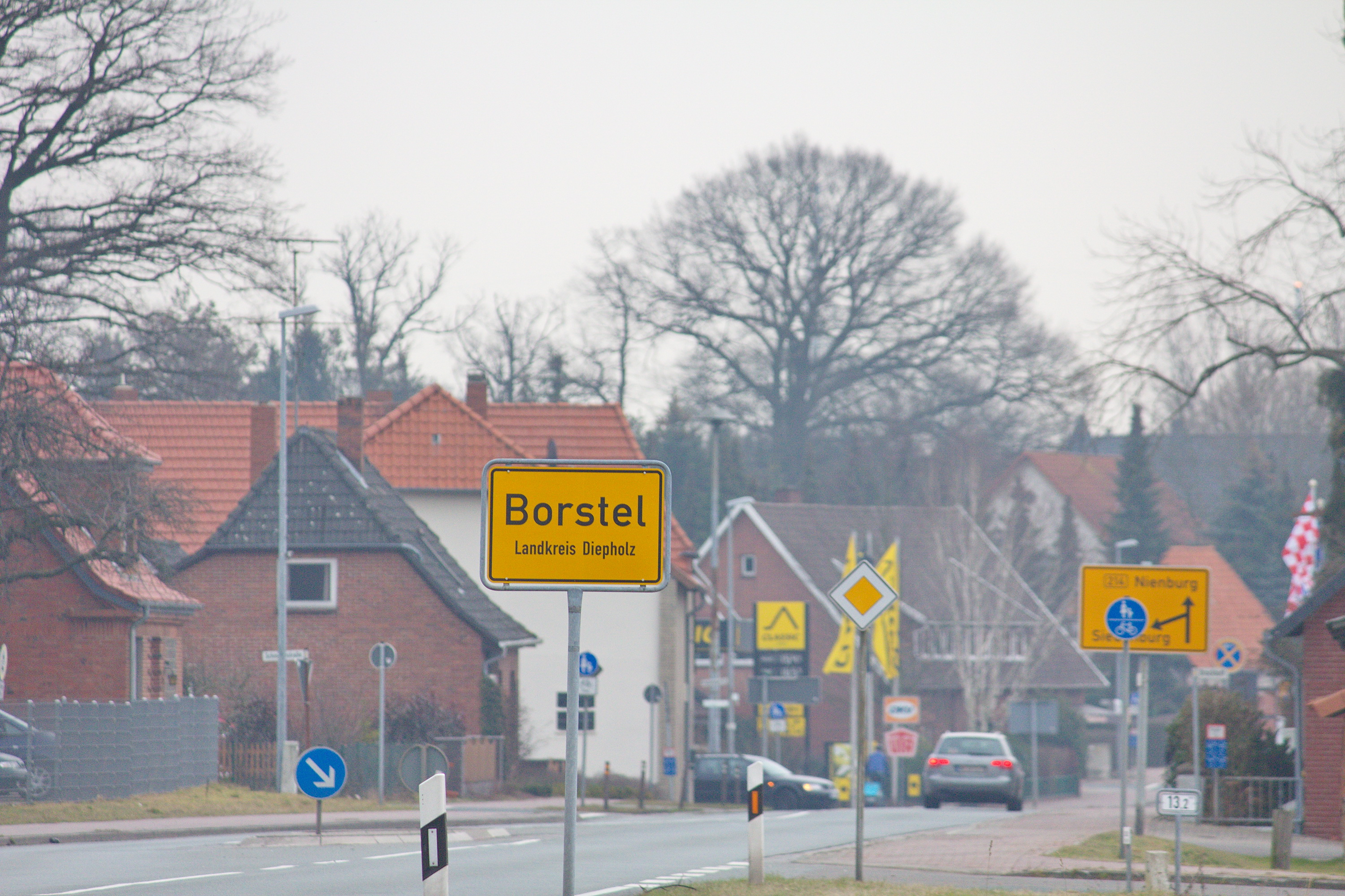 Ortsblick in Borstel im Landkreis Diepholz, Niedersachsen, Deutschland.